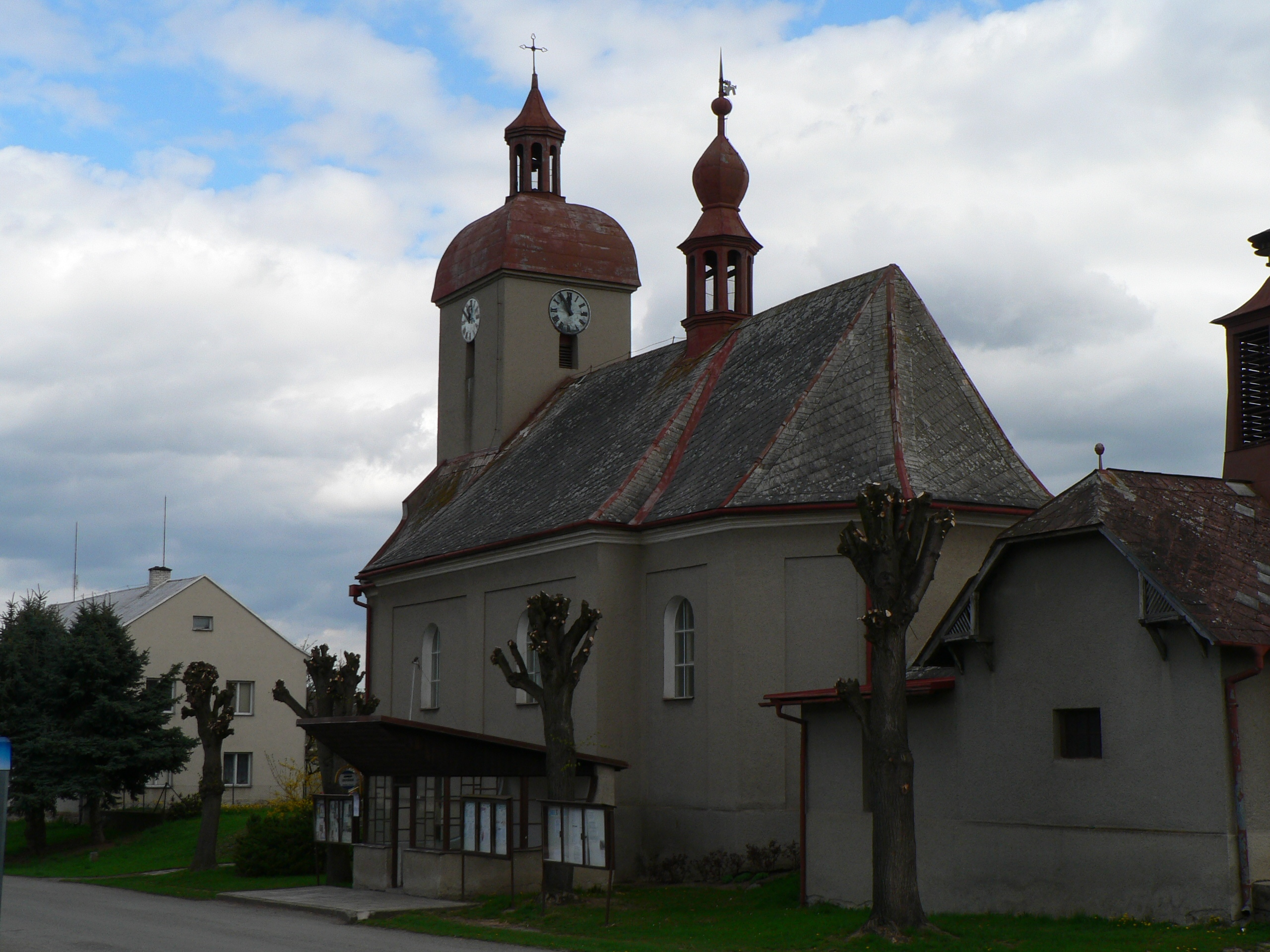 Kostel sv. Josefa v Paloníně.